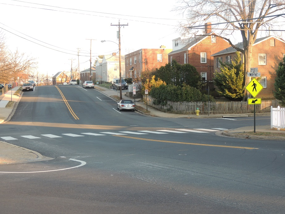 Пенроуз, район в округе Арлингтон, штат Вирджиния